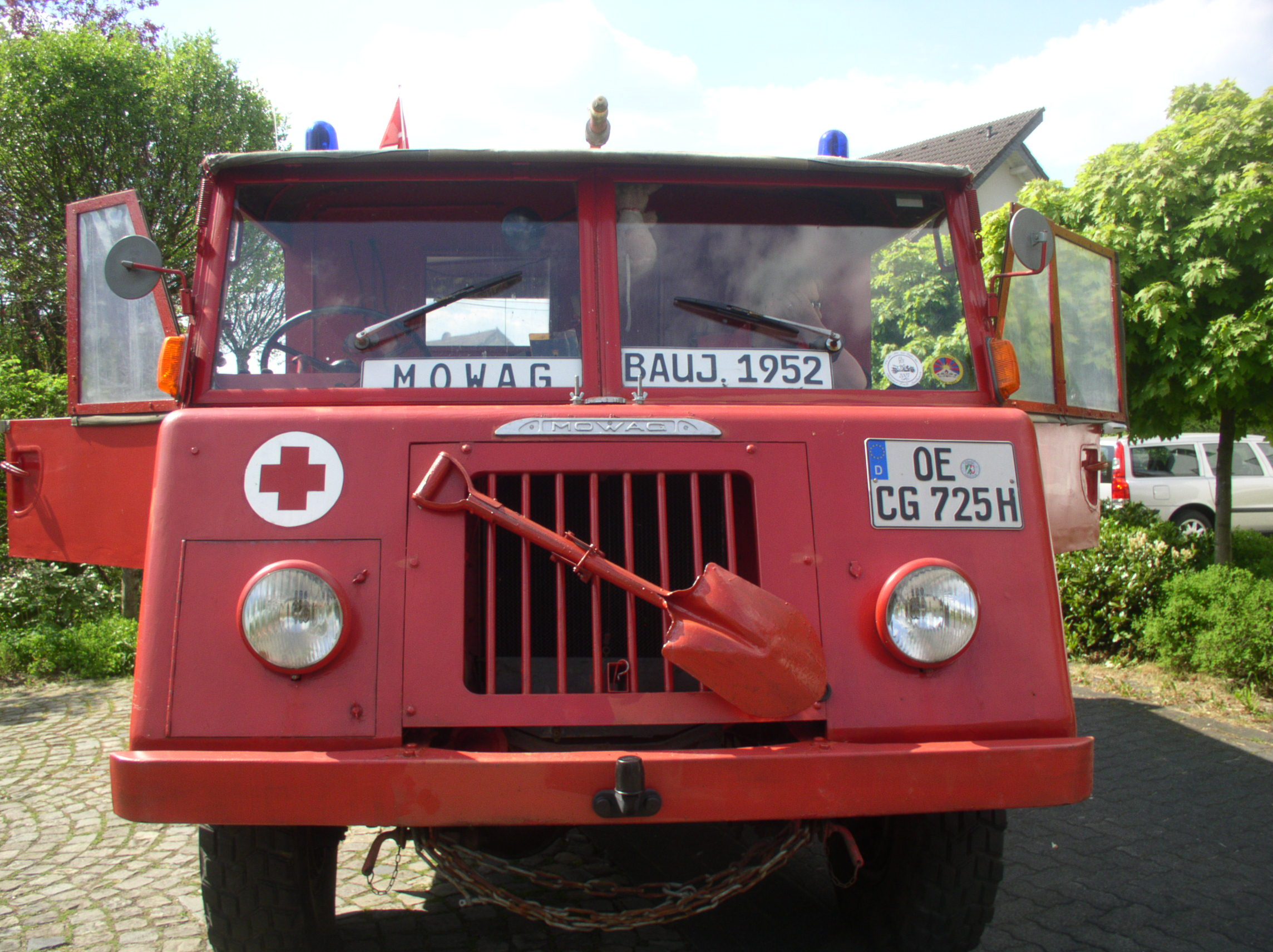 Fire brigade vehicle (Mowag, Switzerland). Built in 1952. Vehicle contains Dodge engine.